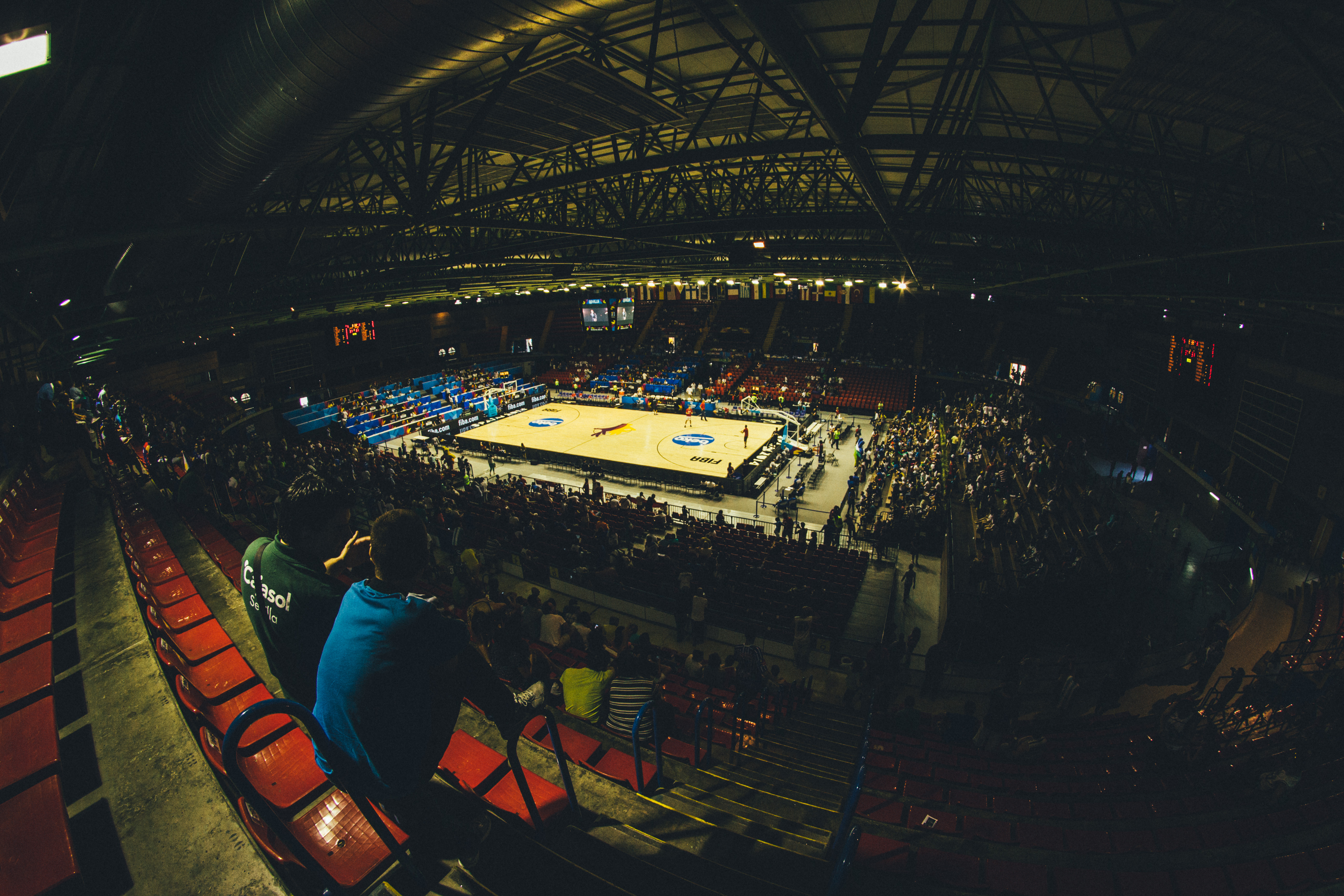 Palacio de Deportes San Pablo